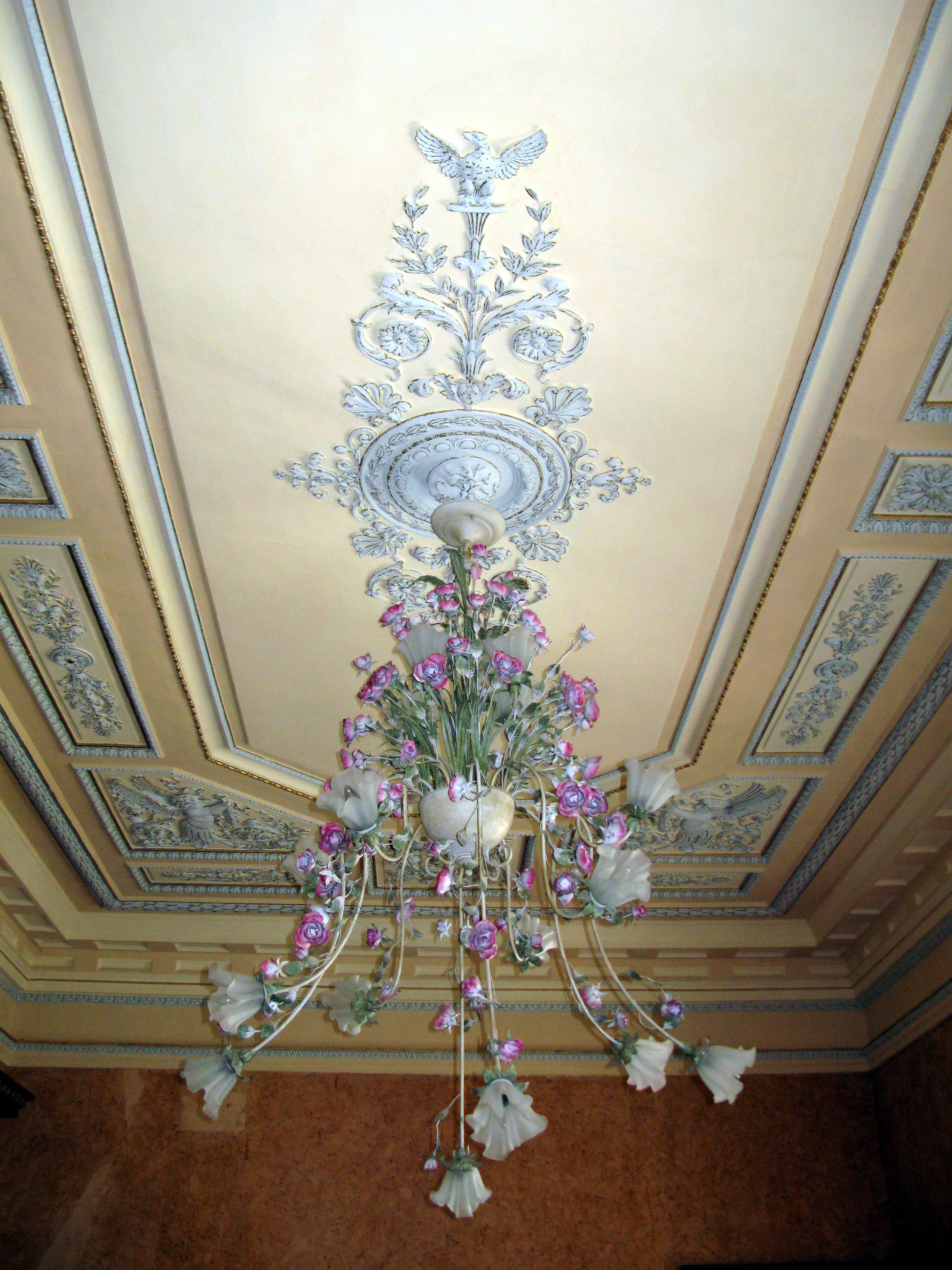 Палац (мур.), Качанiвка